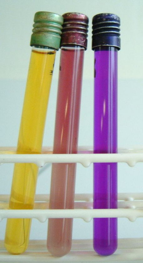 Désaminases et Dihydrolase de Serratia marcescens Lycée Paul Éluard Saint Denis Jean-Noël JOFFIN